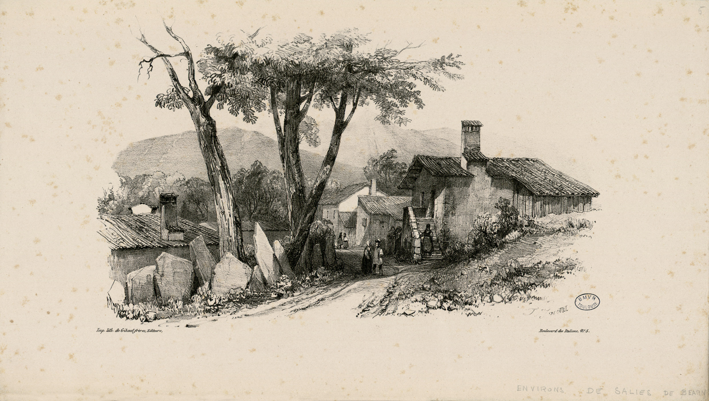 Pl. non légendées dans le texte, mais notes ms. : hypothèse de localisation Ancely, René (1876 - 1966). Possesseur